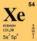 Ксенон